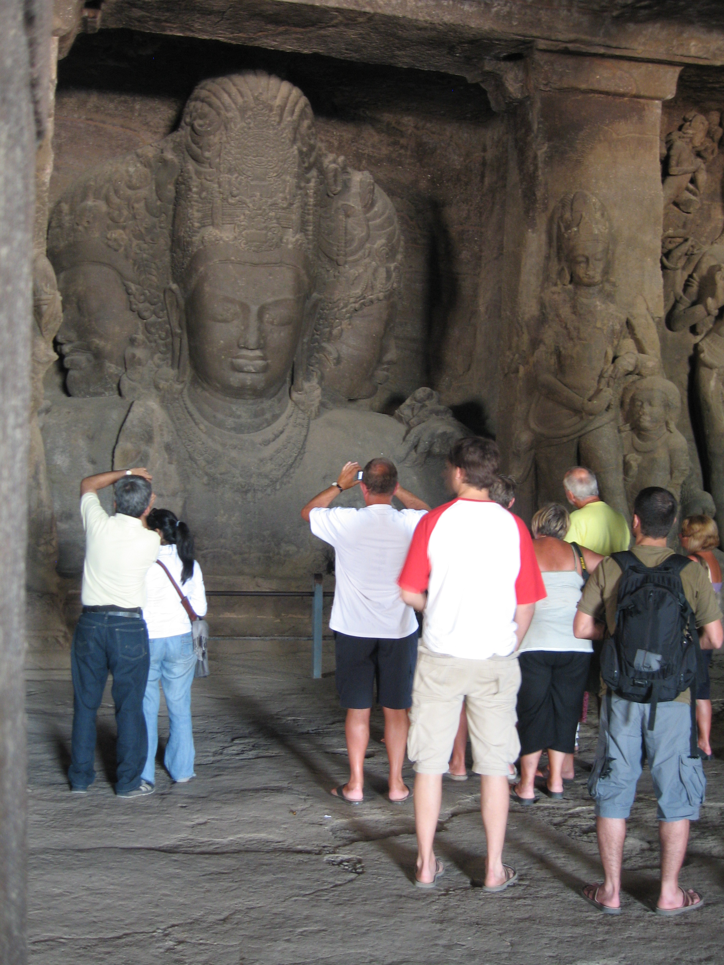 Elephanta tourists